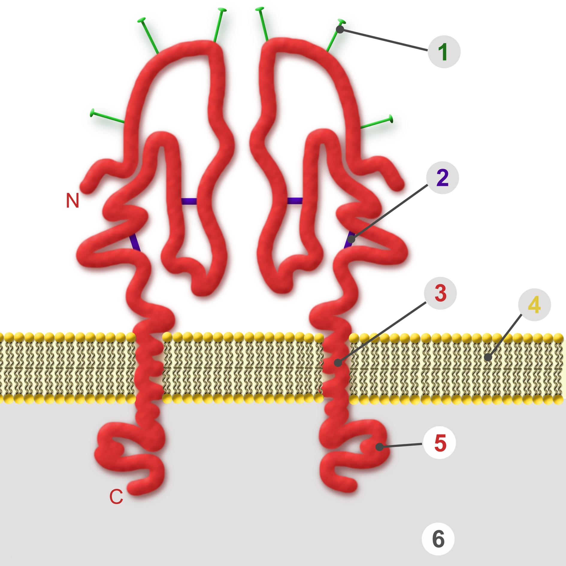 Einlagerung und Dimerisierung zweier viraler Hüllproteine in die Zellmembran: (1) Oligosaccaridreste, (2) Disulfid-Brücken (3), transmembranäre Helix, (4) Zellmembran, (5) intrazellulärer Anker, (6) Cytoplasma, (N) N-Terminus, (C) C-Terminus.